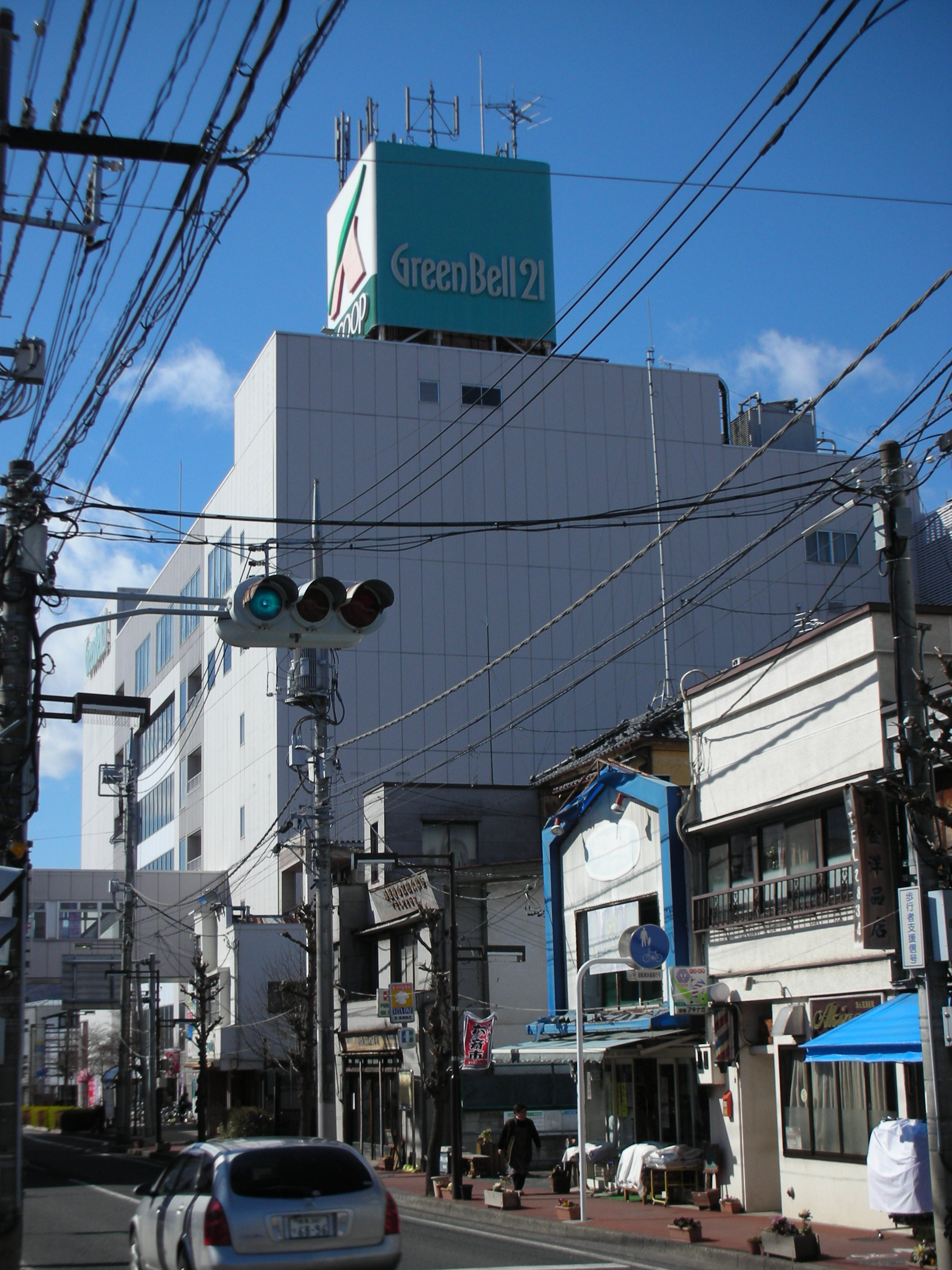 グリーンベル21の外観